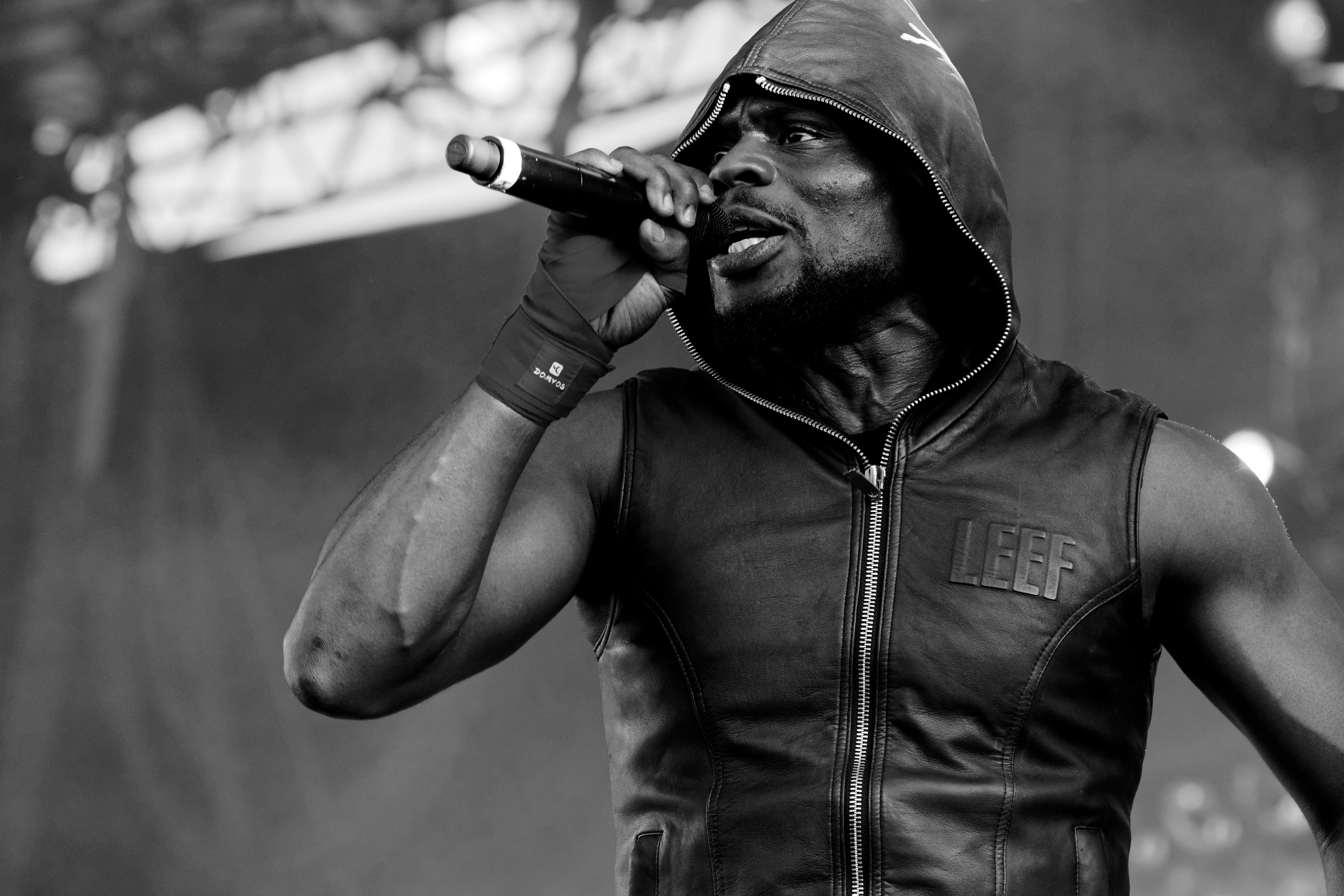 Kery James en concert lors du festival des vieilles charrues 2017.